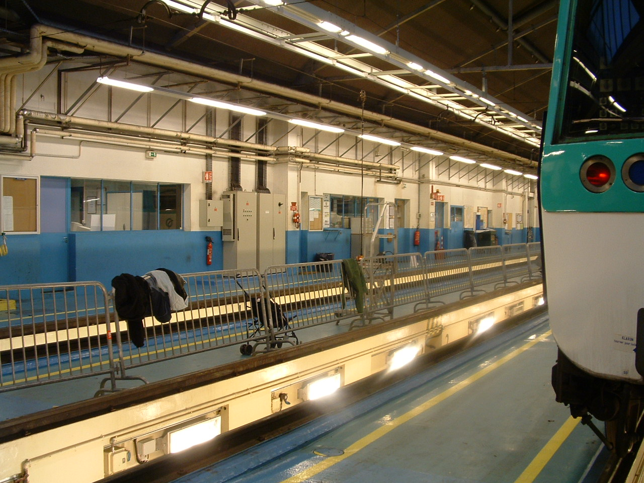 Train MF 77 aligné sur fosse de visite aux ateliers de Choisy.